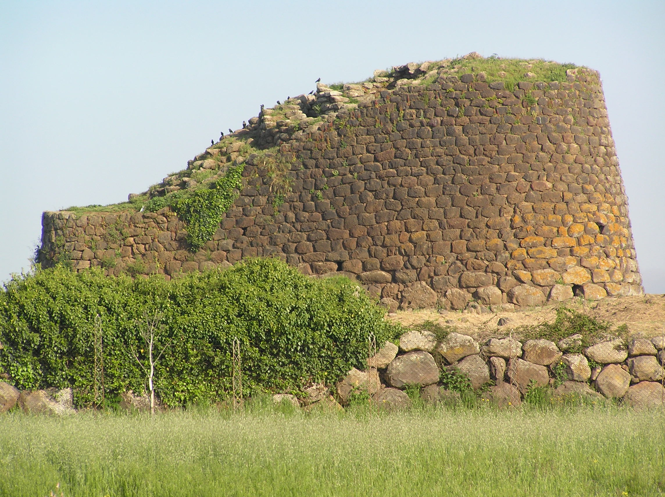 Foto scattata da me.